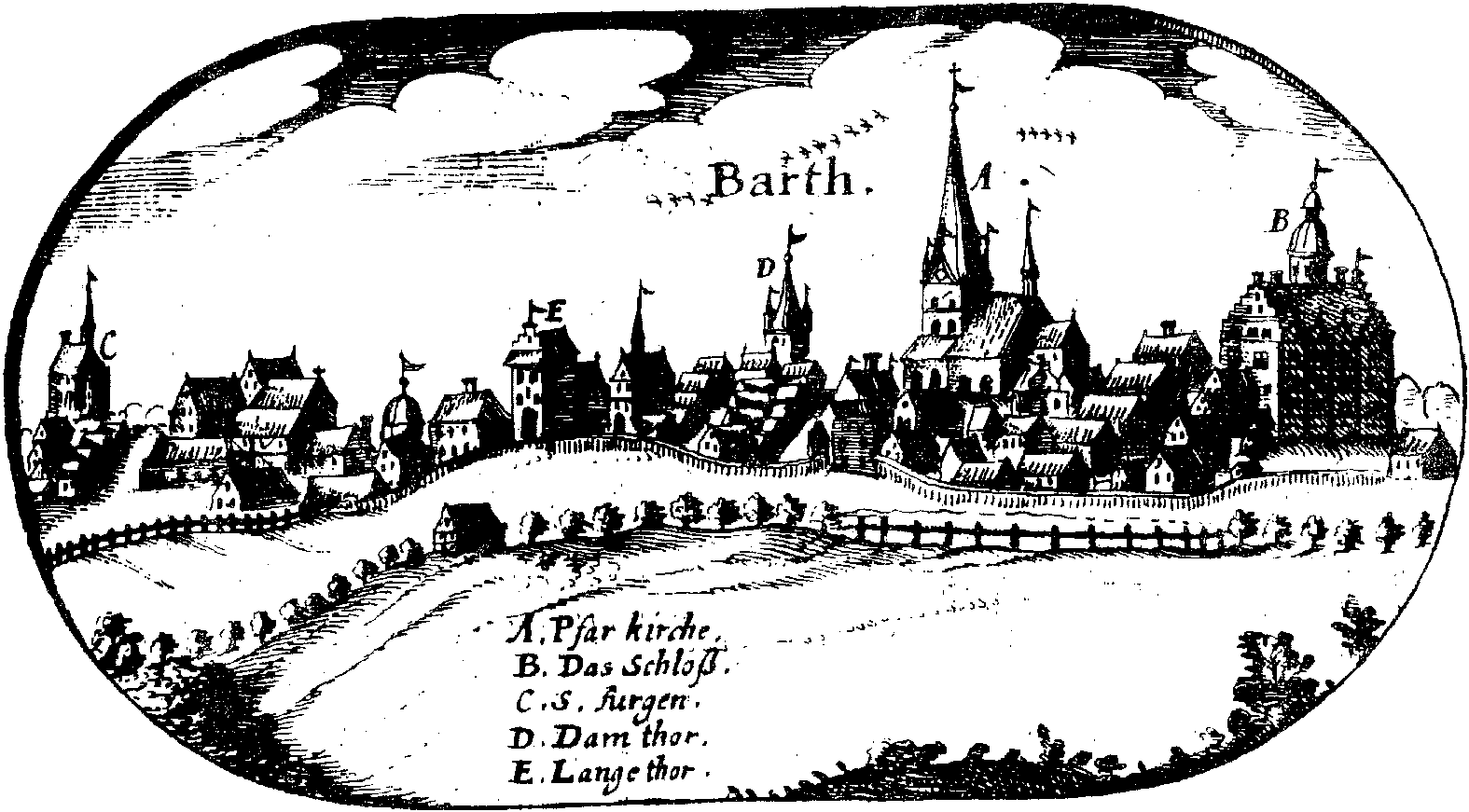 Ansicht von Barth